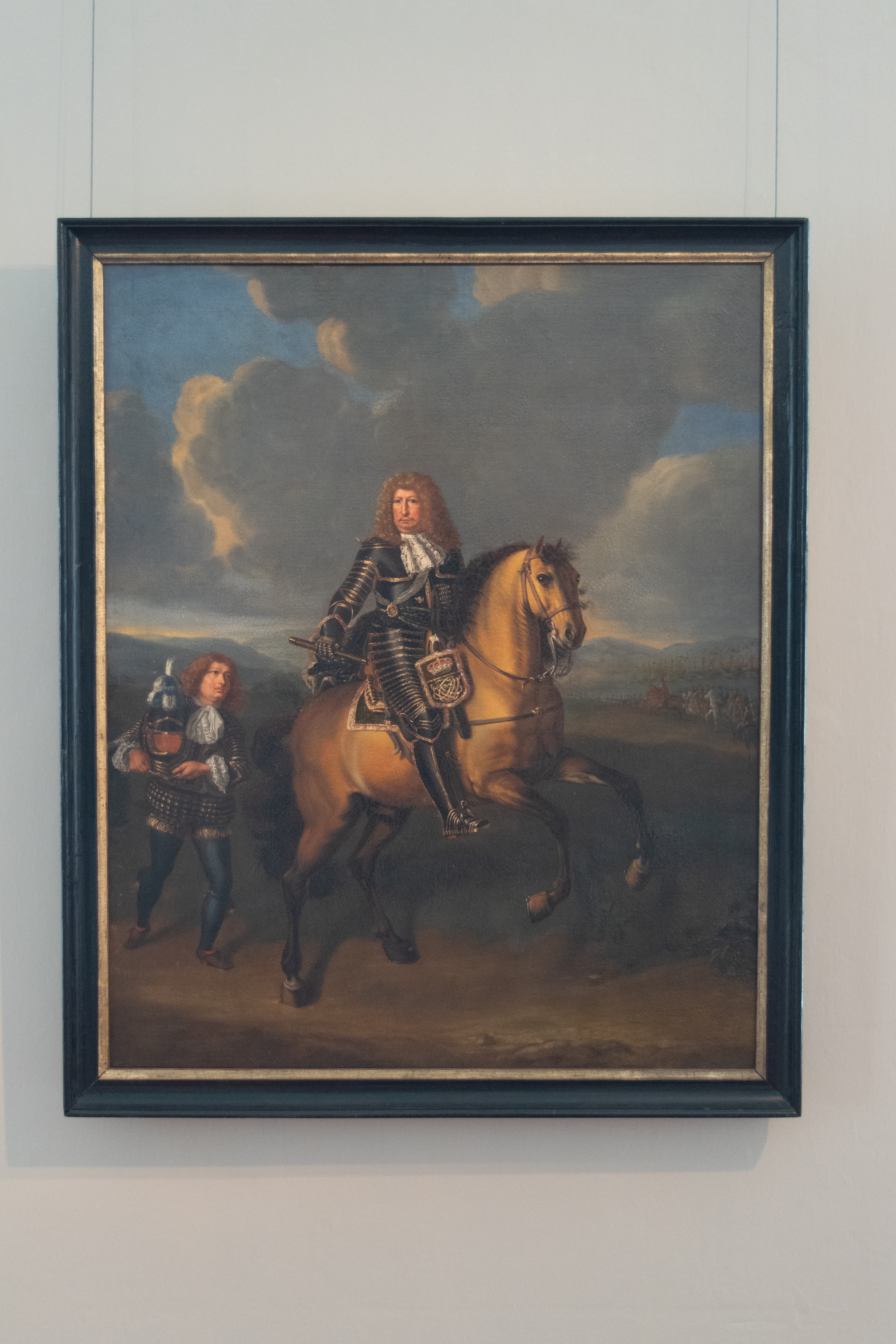 Glam on Tour Jagdschloss Grunewald, Berlin